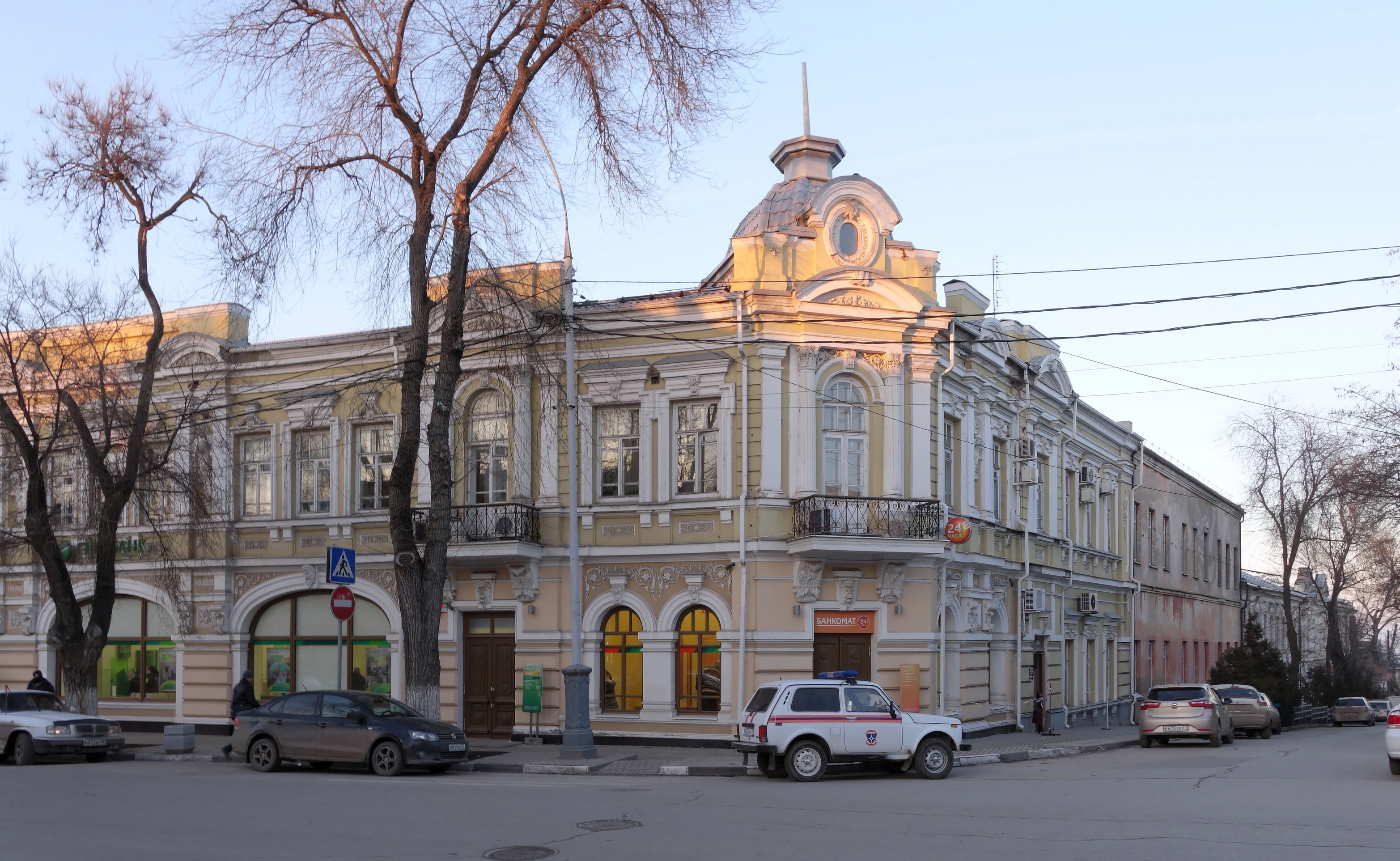 Taganrog Таганрог